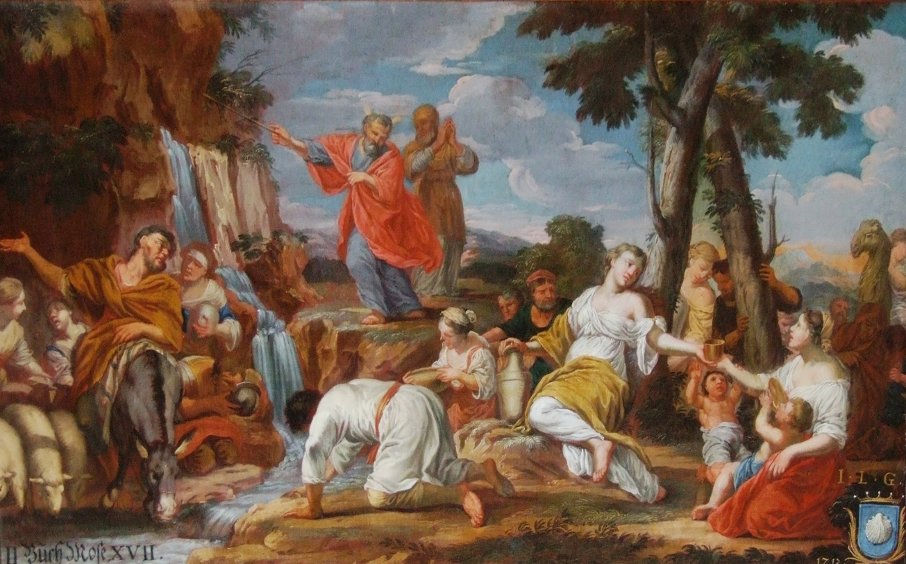 Ölbild in der Sakristei der Kirche Unser Frauen zu Memmingen